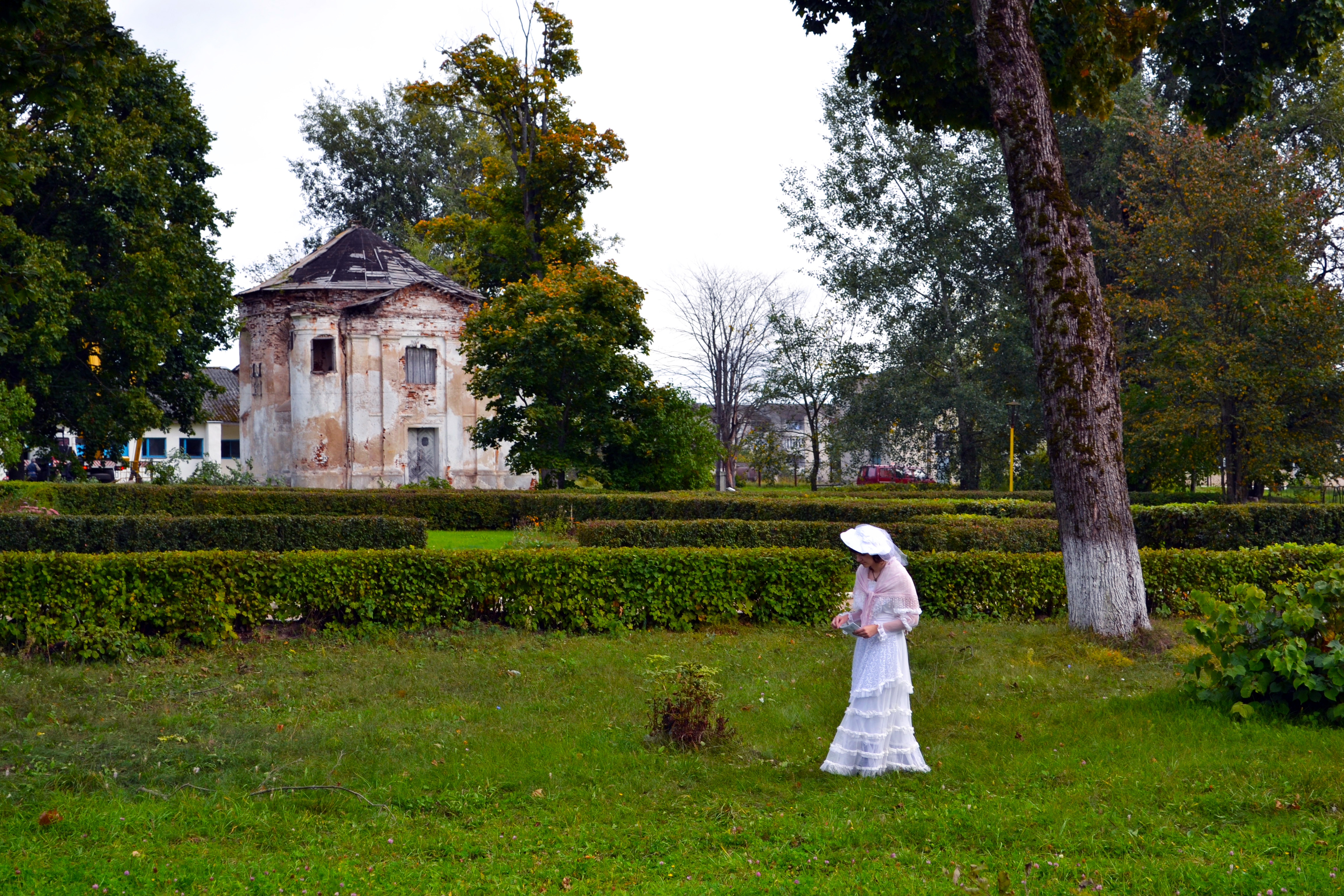 Беларуская (тарашкевіца): Кальвінскі збор, парк на былой сядзібе «Кухцічы» (мяст. Першамайск, Узьдзенскі раён) This is a photo of Belarusian heritage monument. Reference number: 612Г000628 ( WLM)